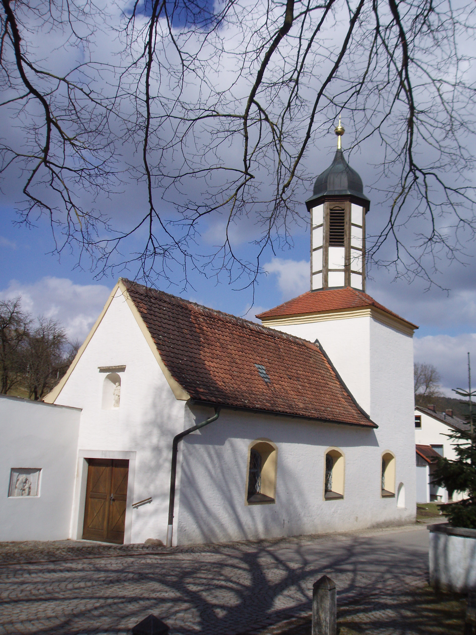 Walting_im_Landkreis_Eichstätt_St._Leonhard